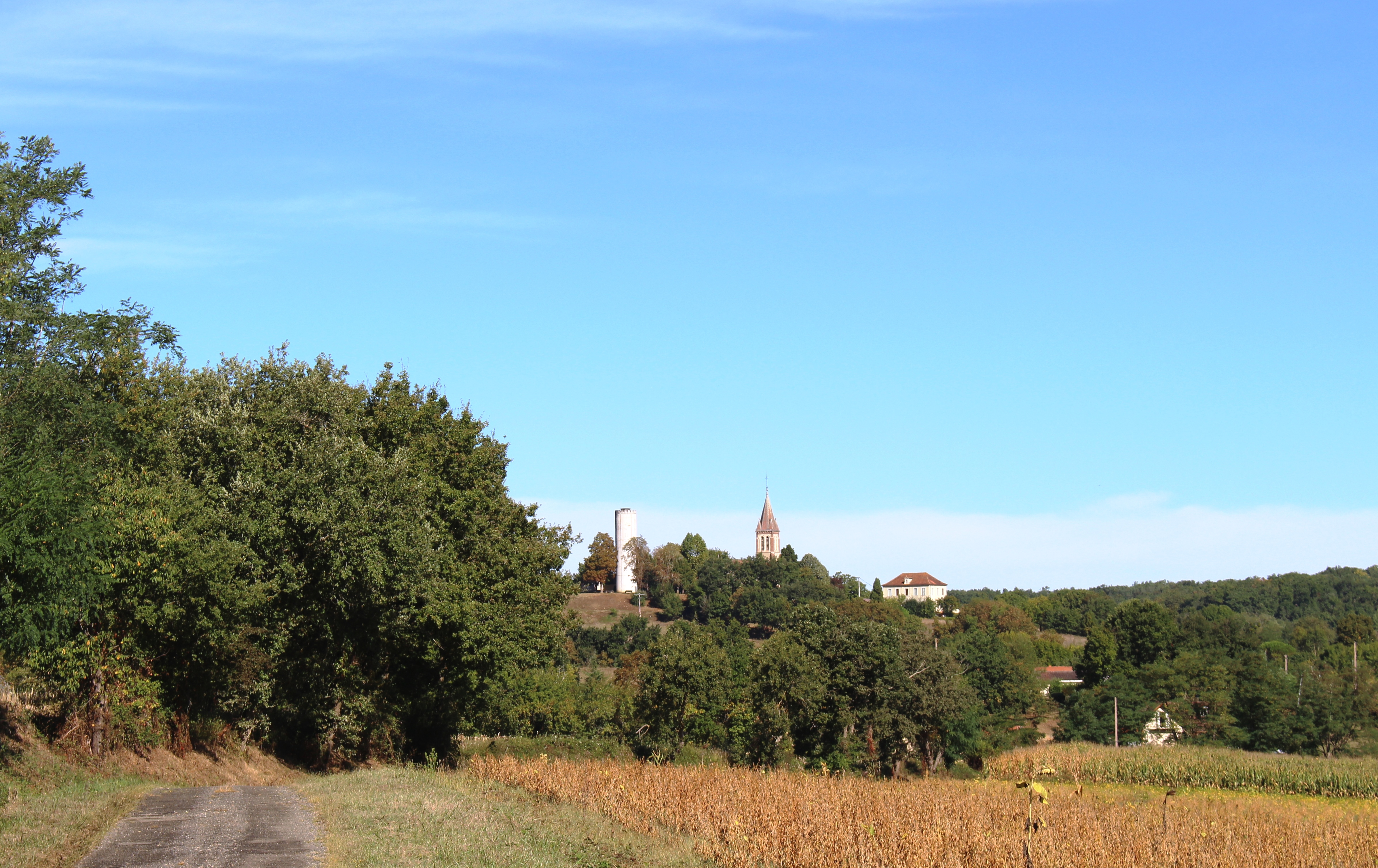 Sauveterre (Hautes-Pyrénées)